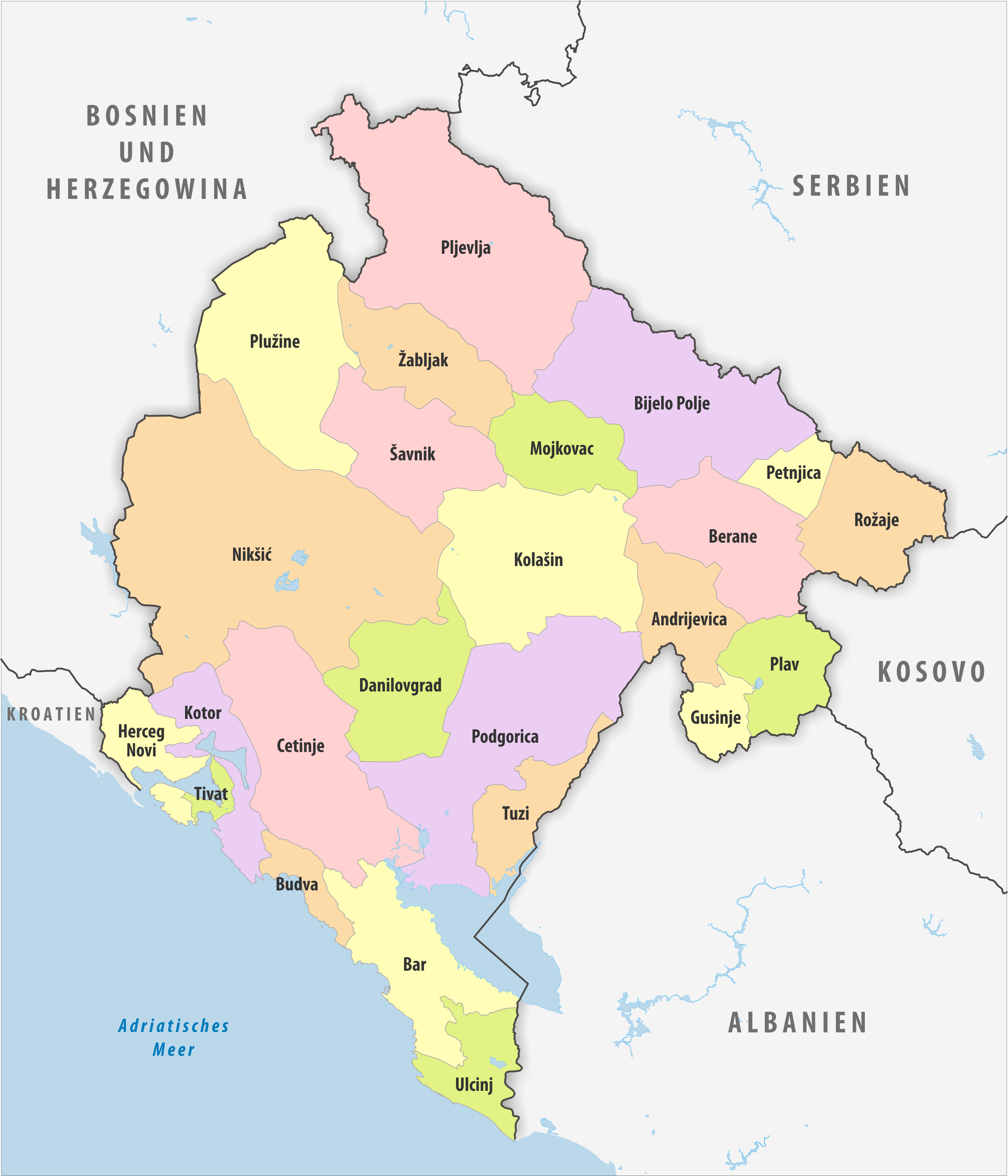 Politische Gliederung Montenegros